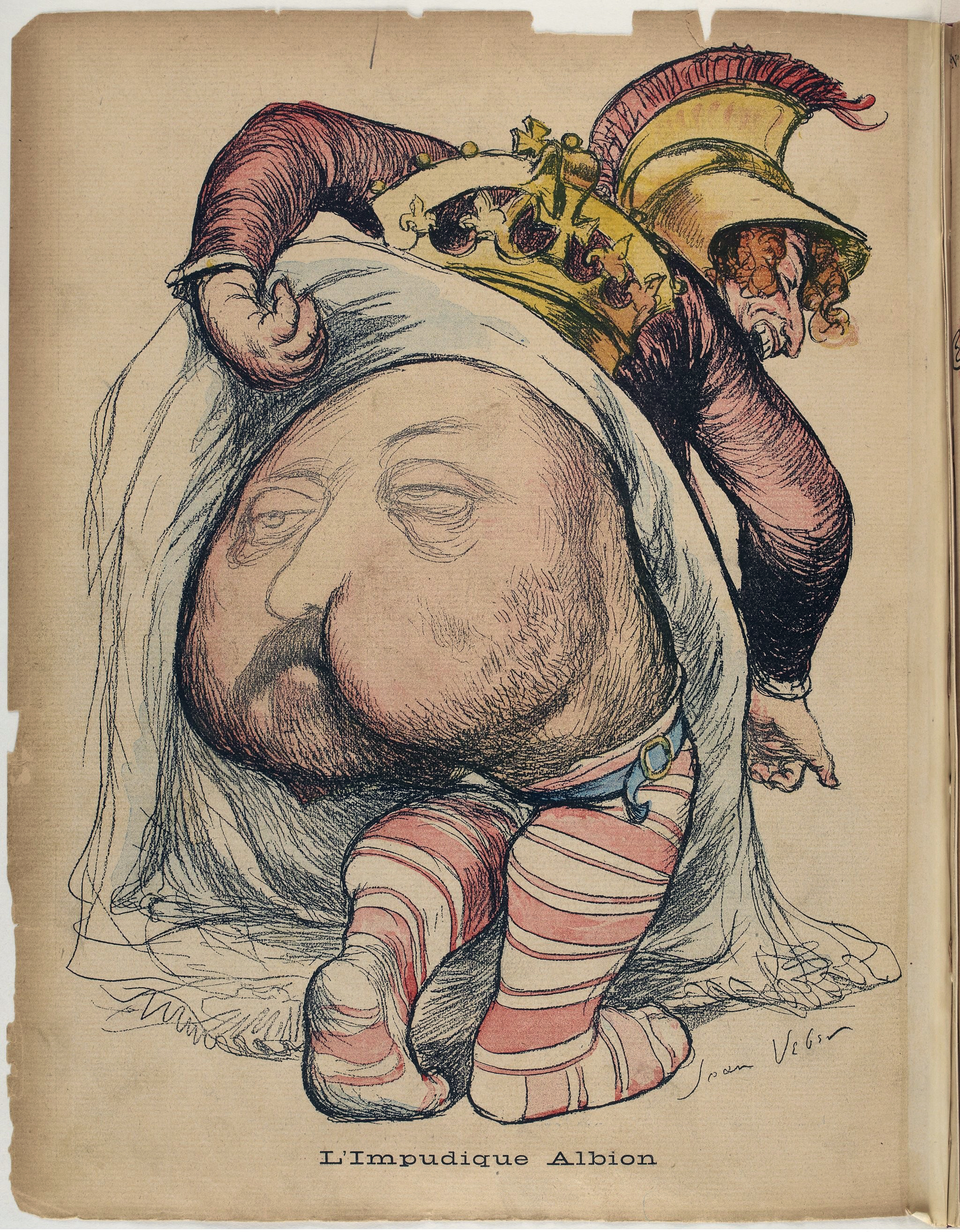 Caricature in L'Assiette au beurre, N° 26